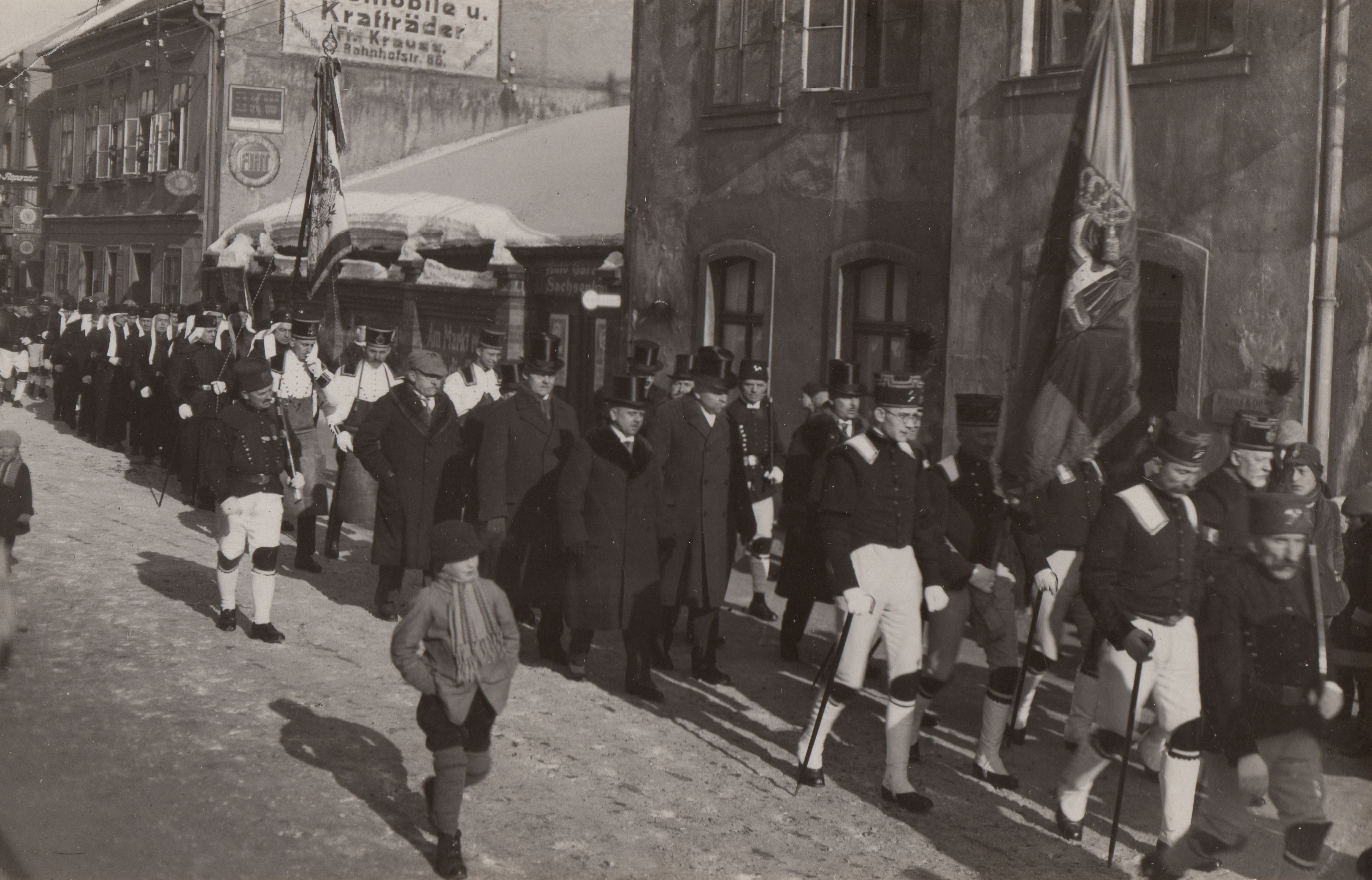 Bergparade am Fastnachtstage, 12.02.1929 in Johanngeorgenstadt (Sachsen)